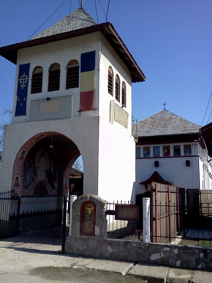 Cele două pisanii ale bisericii vechi